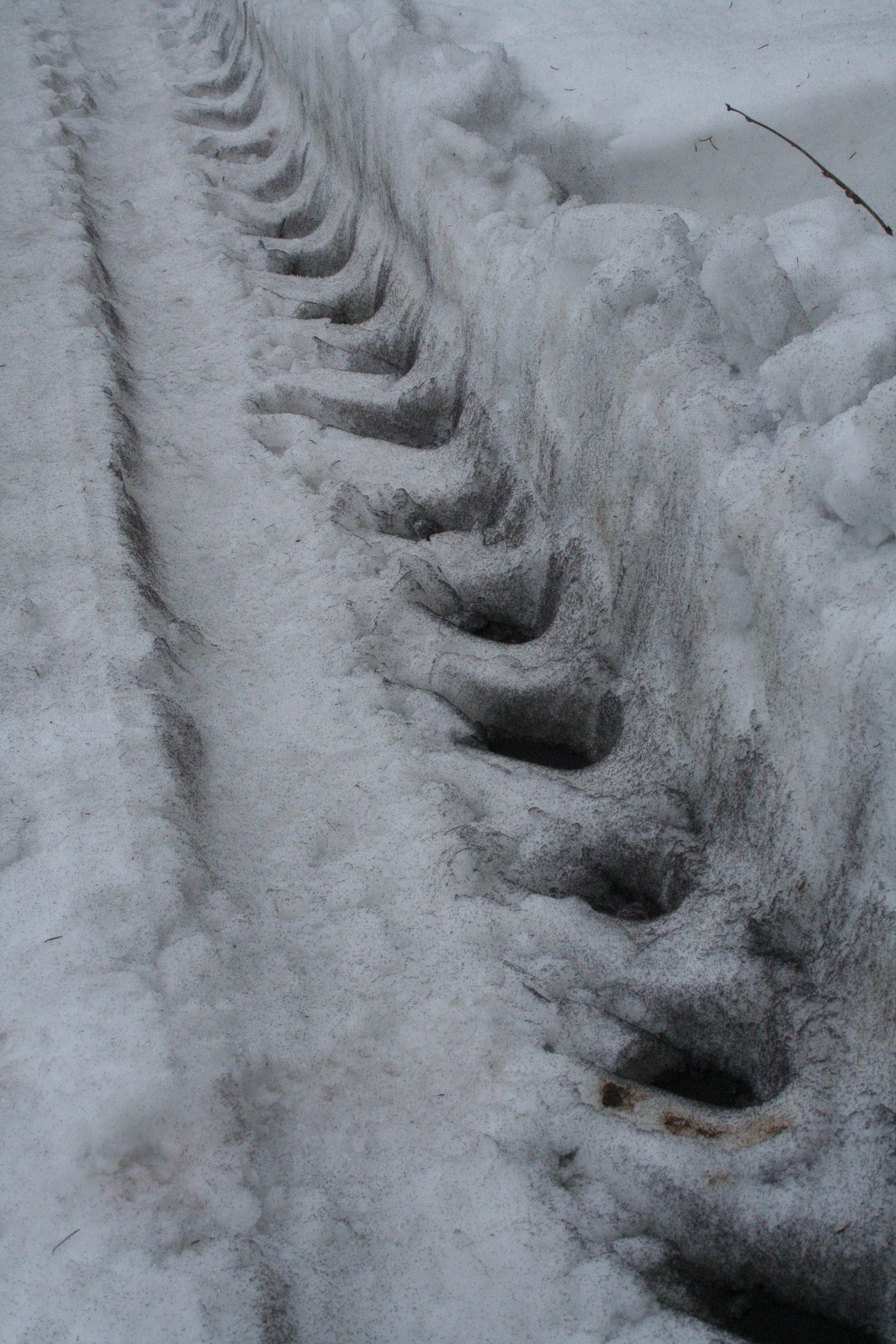 Große Schneefloh Population (Desoria nivalis (Carl, 1910) (syn. Isotoma nivalis)) in einer Traktorspur in einem Wald bei München.